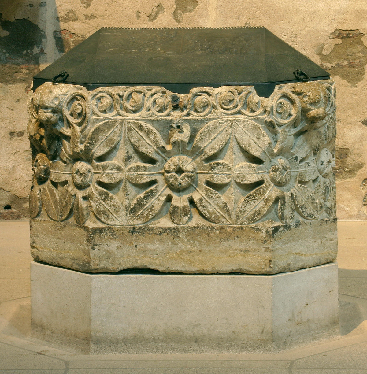 Groß St. Martin, Köln. Taufstein aus dem 13. Jahrhundert